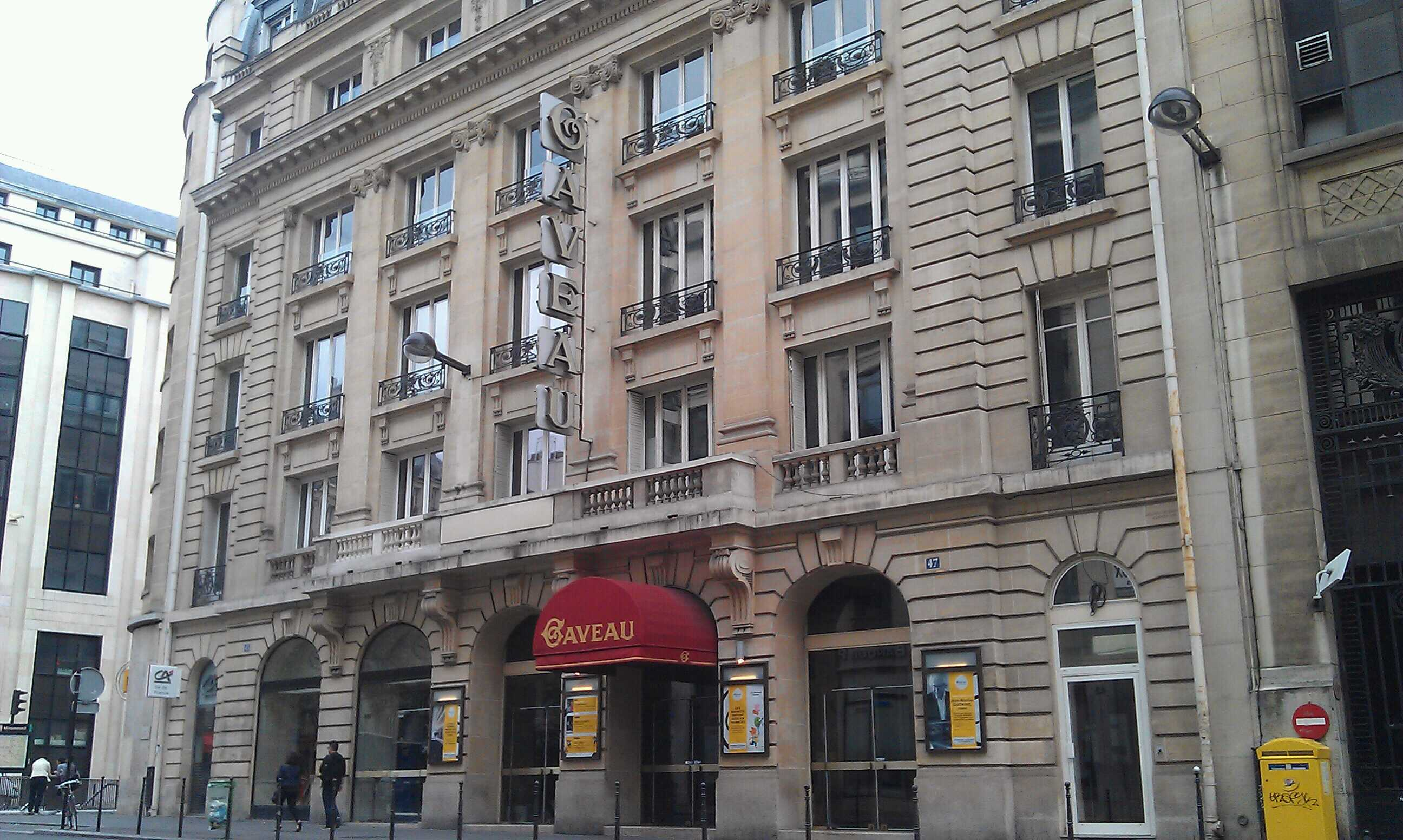 Salle Gaveau . This photo was uploaded with Wiki Loves Monuments mobile 1.2.1 (Android).